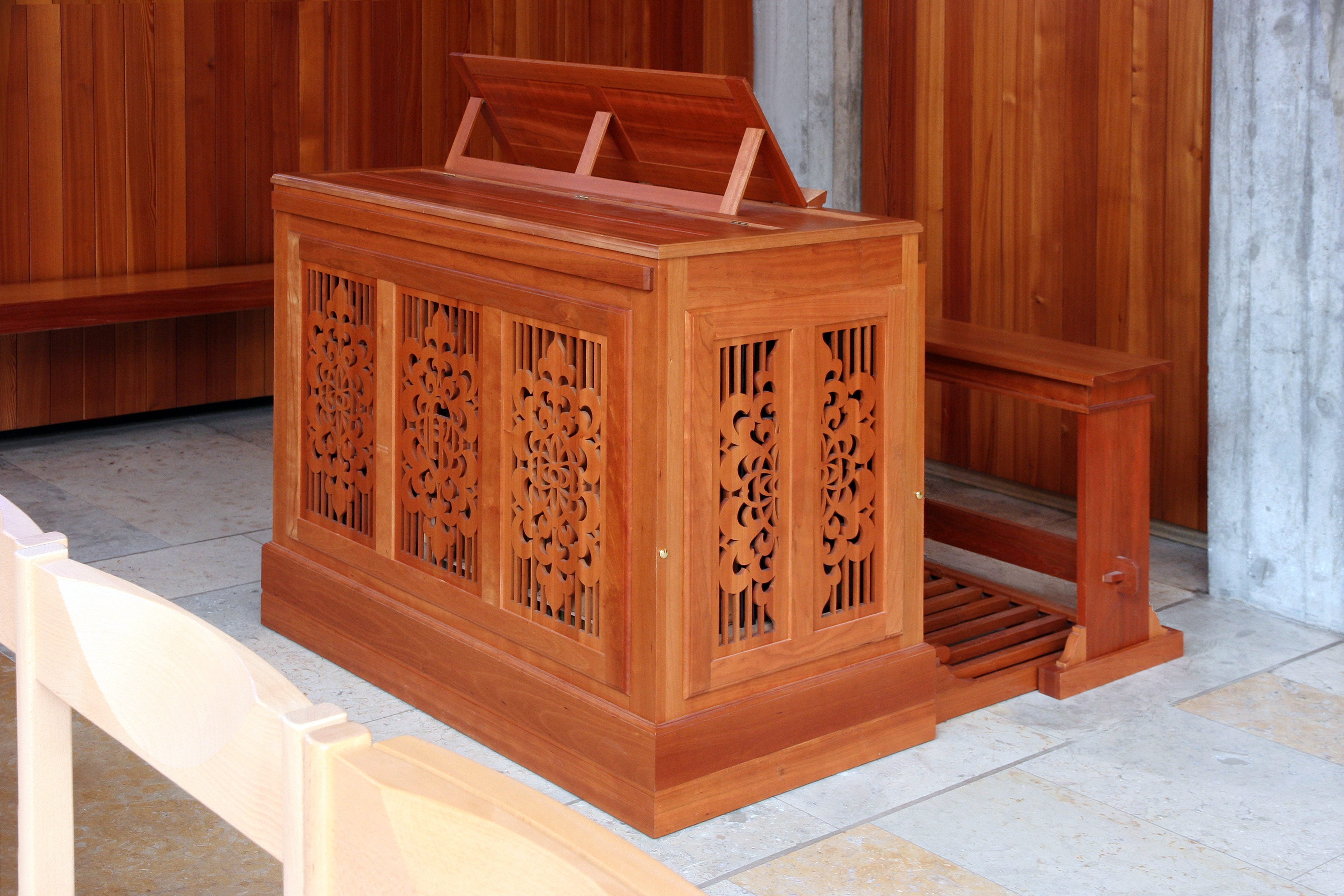 Römisch-katholische Pfarrkirche St. Elisabeth Kilchberg ZH, Truhenorgel